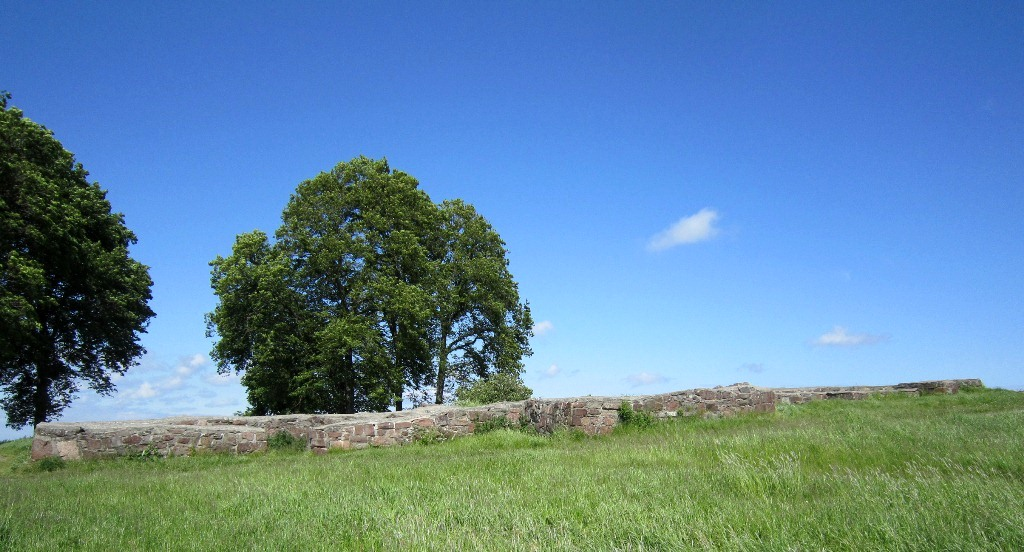 Ruinene av Mikaelskirken på Slottsfjellet i Tønsberg